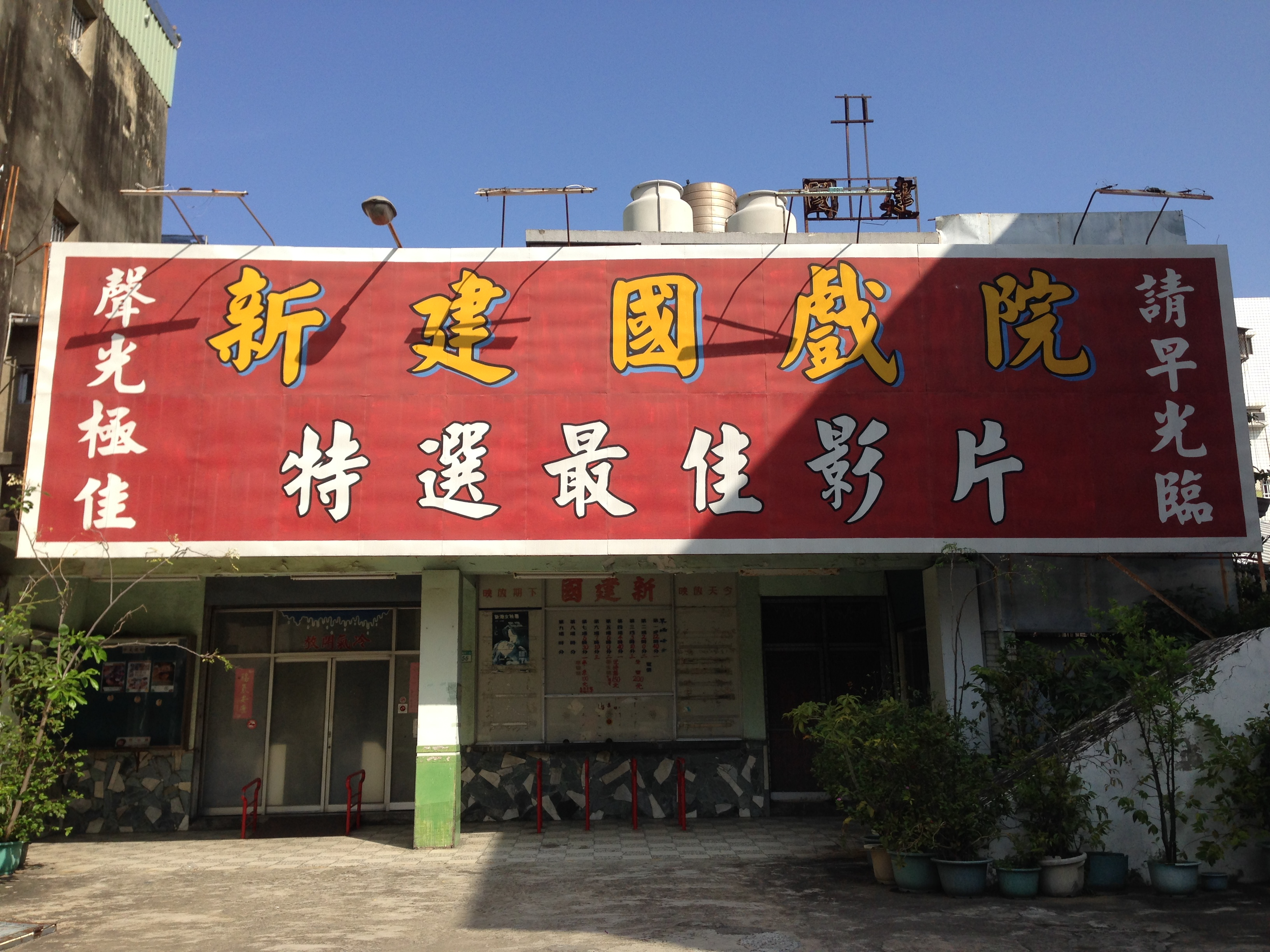 中文（台灣）: 新建國戲院